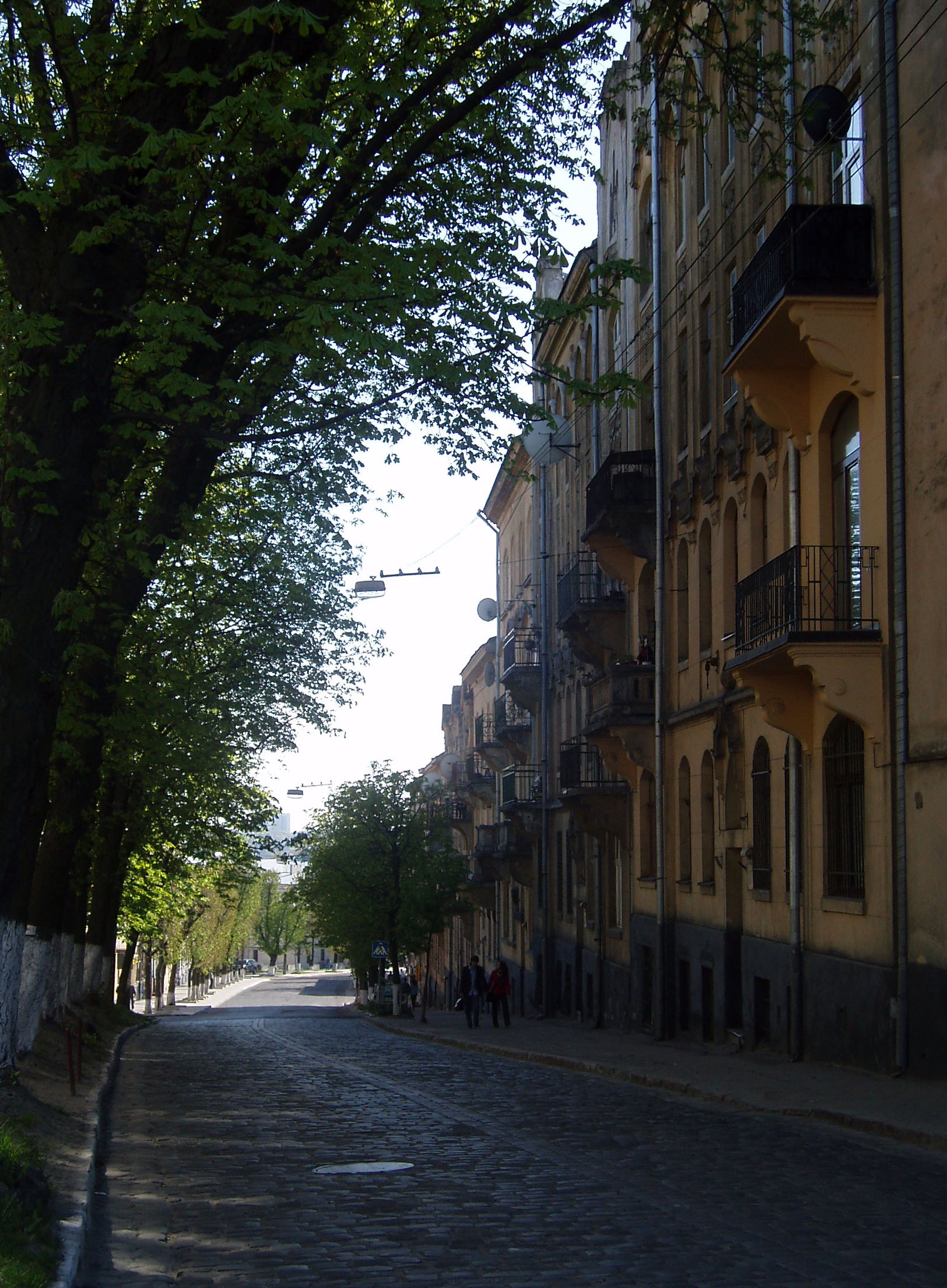 Вулиця Максима Кривоноса у Львові